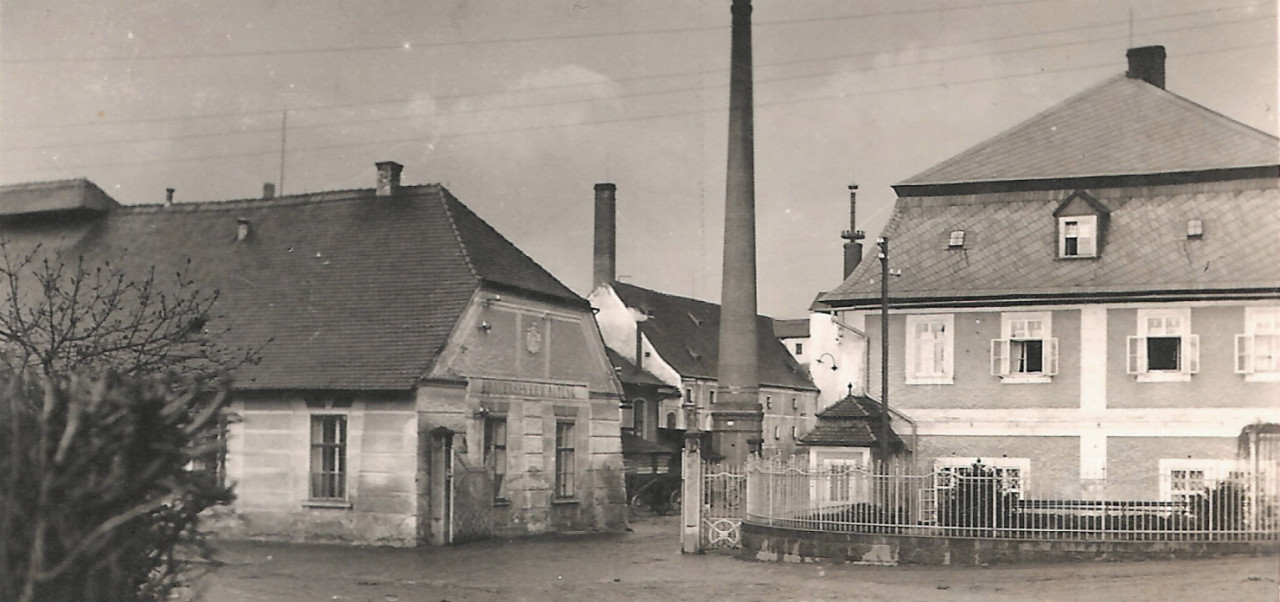 Starý zámek v Lipové, okres Děčín